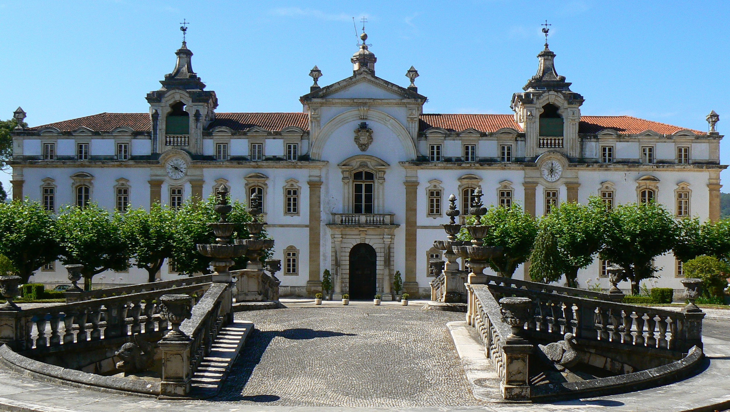 Edifício da autoria de Francesco Tanossi mandado construir pelo Bispo Miguel da Anunciação em 1748, na fachada destaca-se 4 janelas com balaustradas e a janela da varanda do coro da igreja, por cima desta um brazão com as armas dos Condes de Pavolide a quem o Bispo pertencia, duas torres coroadas com corochéu e sinos no interior.A entrada tem um portão em arco de ferro e bronze feito em Bolonha, duas colunas de fuste estriado que suporta a varanda. No interior tem uma bonita capela, destaque para a cúpula pintada por Pasquale Parente em 1760. Este cunjunto de 3 edifícios este o principal "Casa Velha 1748-1765", "Casa Nova 1873", "Casa Novíssima 1880" tem também uns belos jardins de influência barroca.